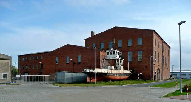 Barth: Blick zur alten Zuckerfabrik (Technikmuseum Barth)